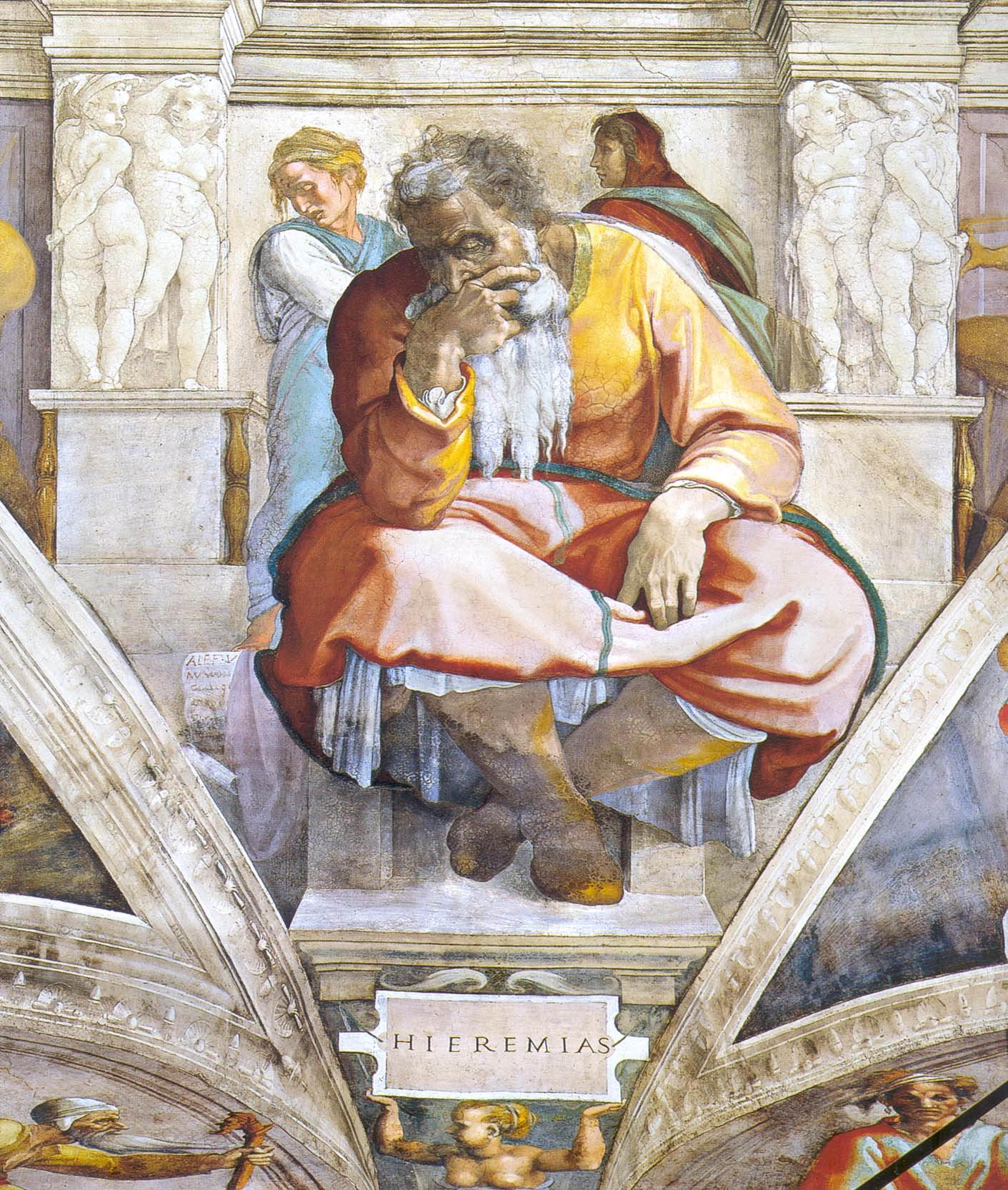 Пророк Иеремия, Роспись свода Сикстинской капеллы